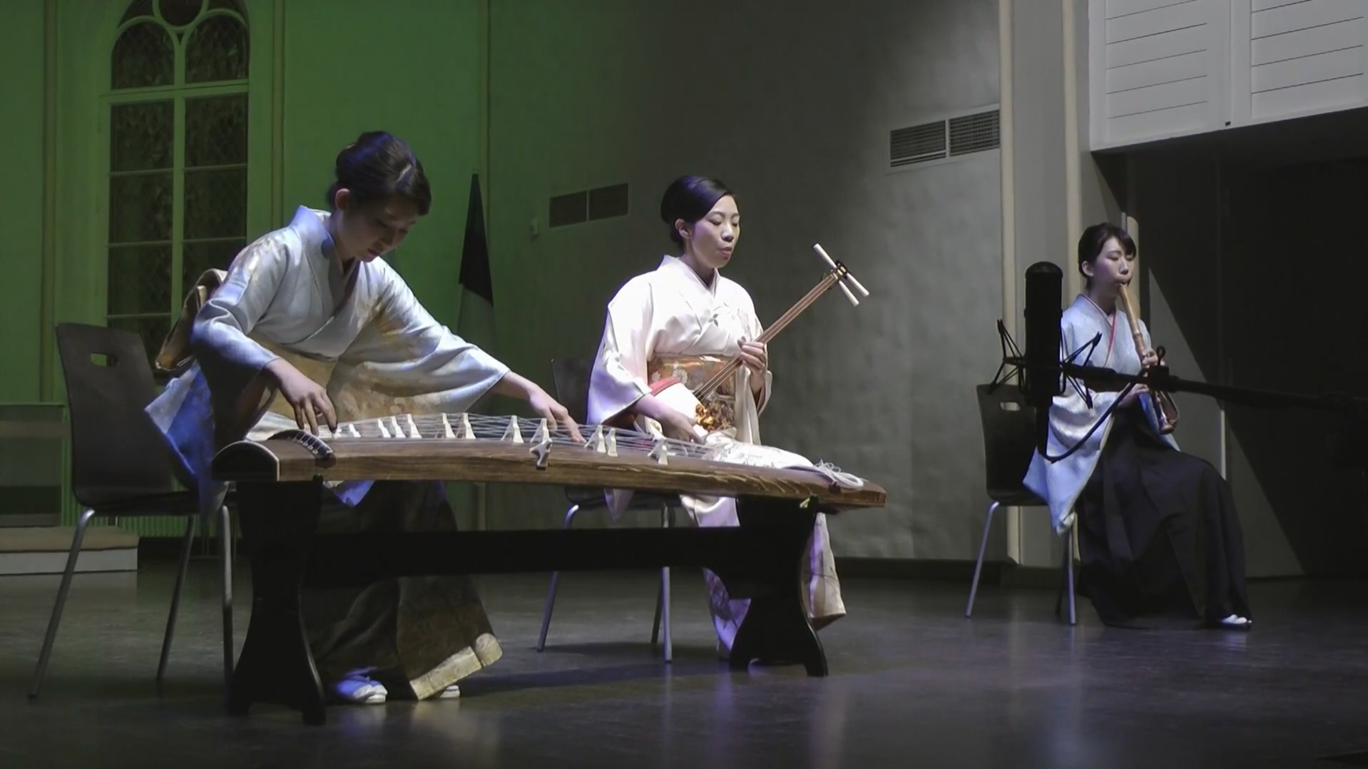 Ансамбль санкёку. Яани кирик, Санкт-Петербург, 21.11.2016